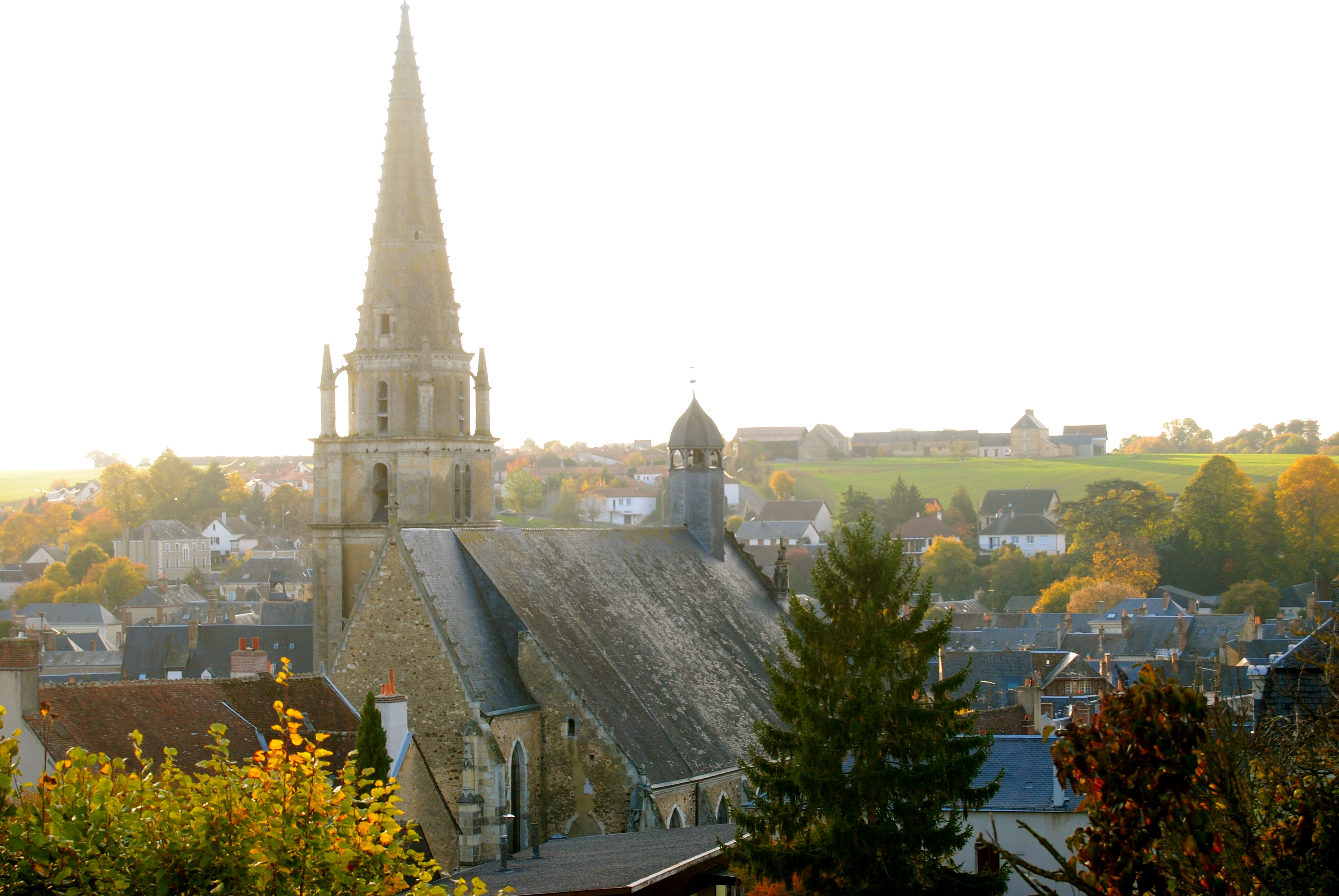 Vue de l'église Notre-Dame de Saint-Calais et d'une partie de la ville.